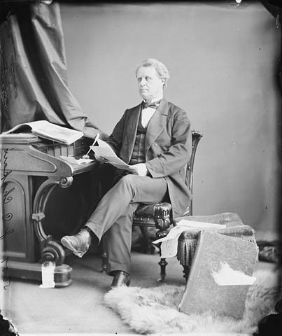 Hon. Jean-Charles Chapais, (Receiver Genera) b. Dec. 2, 1811 - July 17, 1885. Jean-Charles Chapais est un homme d'affaires et un homme politique québécois. Il est né le 2 décembre 1811 à Rivière-Ouelle, fut éduqué à Nicolet et est décédé le 17 juillet 1885. Il est considéré comme l'un des pères de la Confédération canadienne pour sa participation à la Conférence de Québec (1864) visant à déterminer la forme du futur gouvernement du Canada.